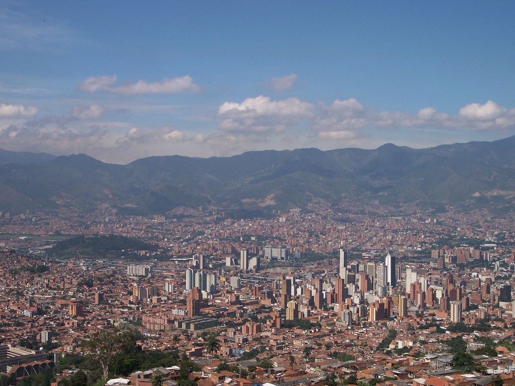 Panoramska fotografija grada Medellín, Kolumbija